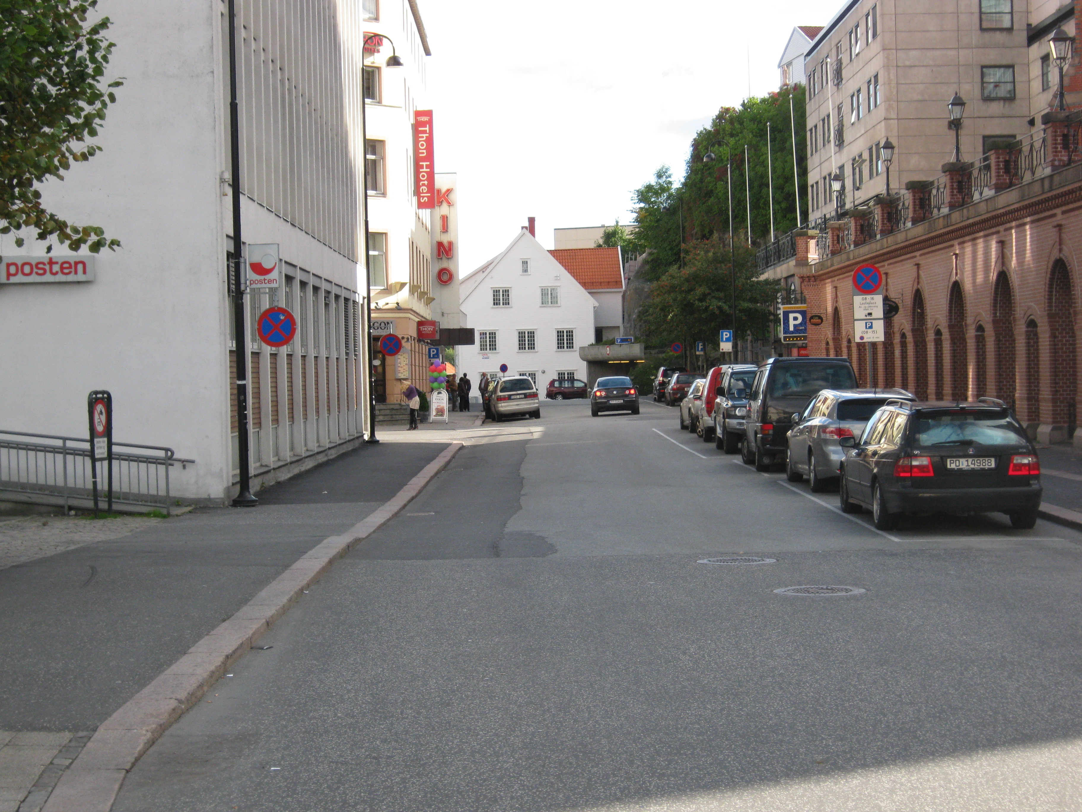 Friergangen i Arendal